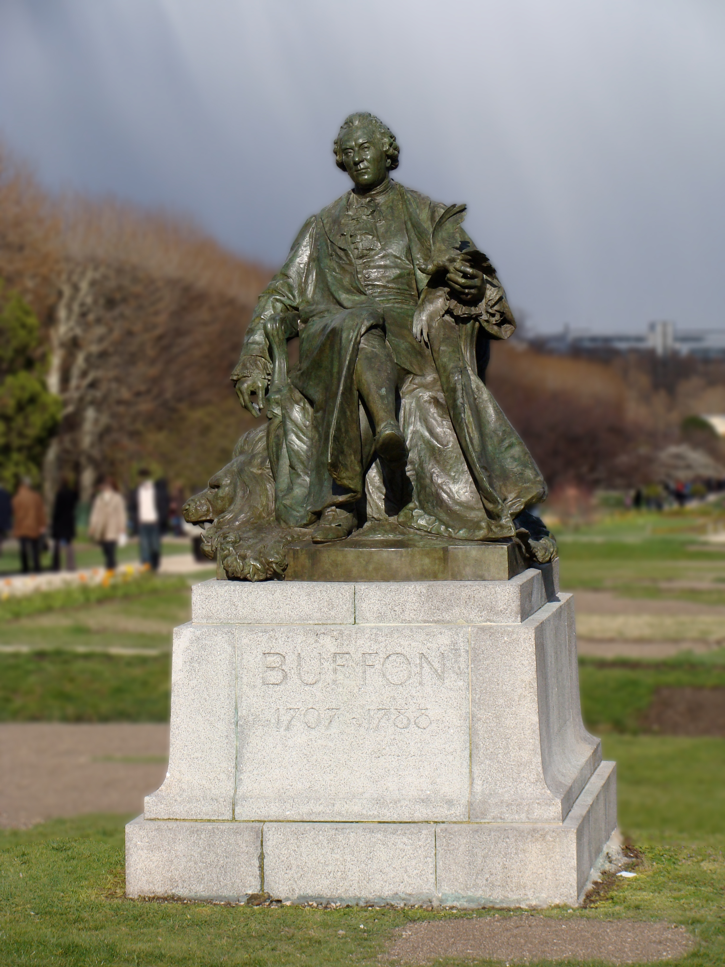 due to archaeodontosaurus